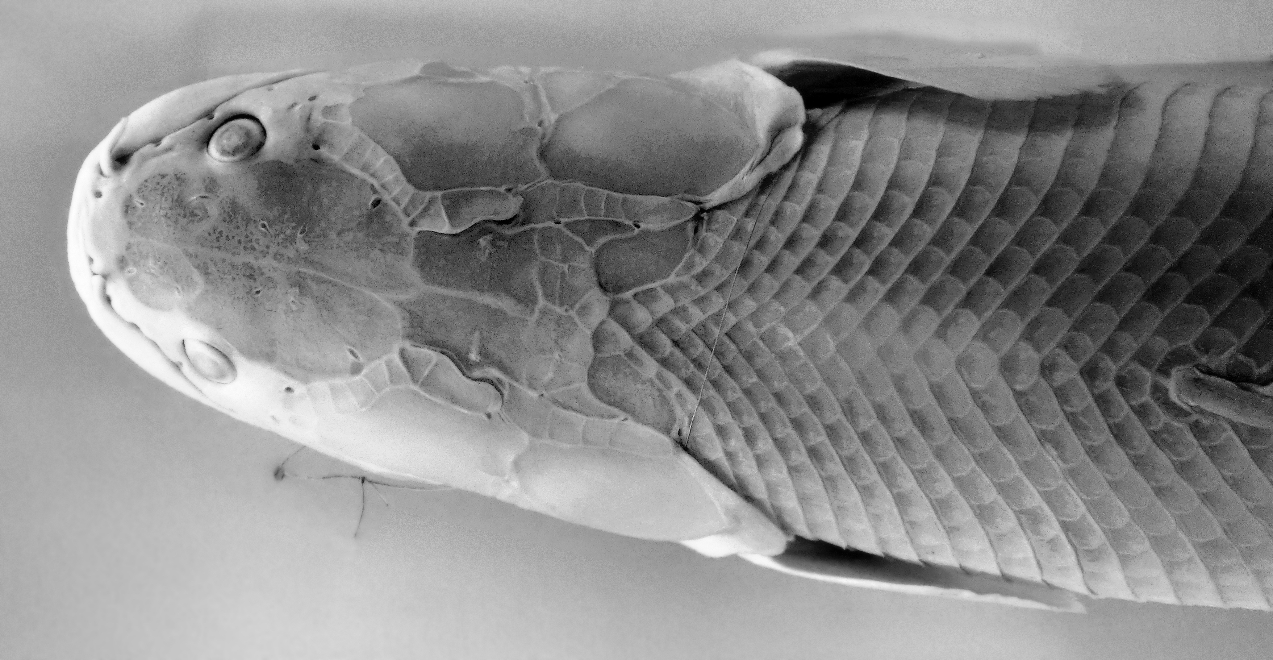 Nilfengädda (Polypterus bichir) från Vita Nilen i Sudan i en glasburk på Göteborgs Naturhistoriska museum, Göteborg, Västra Götaland, Sverige. Bilden visar fengäddans huvud ovanifrån. Bilden är gjord svartvit för att slippa originalfotots störande färgstick. Foto och bildbearbetning av Gunnar Creutz.